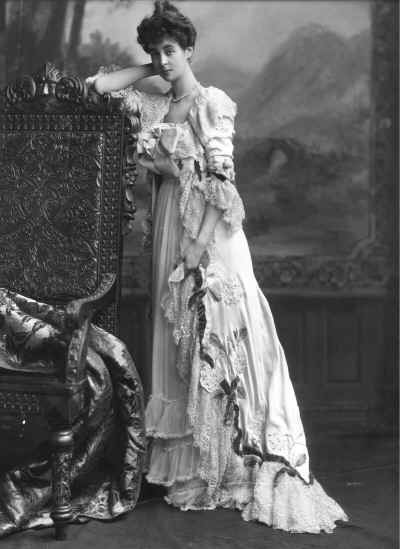 Consuelo Vanderbilt